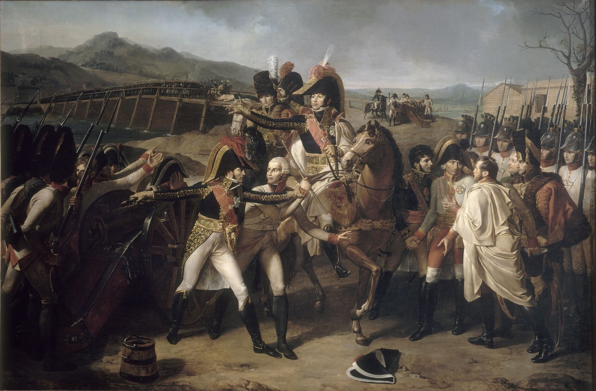 Die Überraschung an der Großen Taborbrücke über die Donau vom 14. November 1805: Die Marschälle Lannes und Murat, begleitet von General Bertrand, der allein vorrückte, schafften es, die österreichischen Armee von einem Waffenstillstand zu überzeugen und hinderten sie daran, die Brücken der Donau außer Betrieb zu setzen.